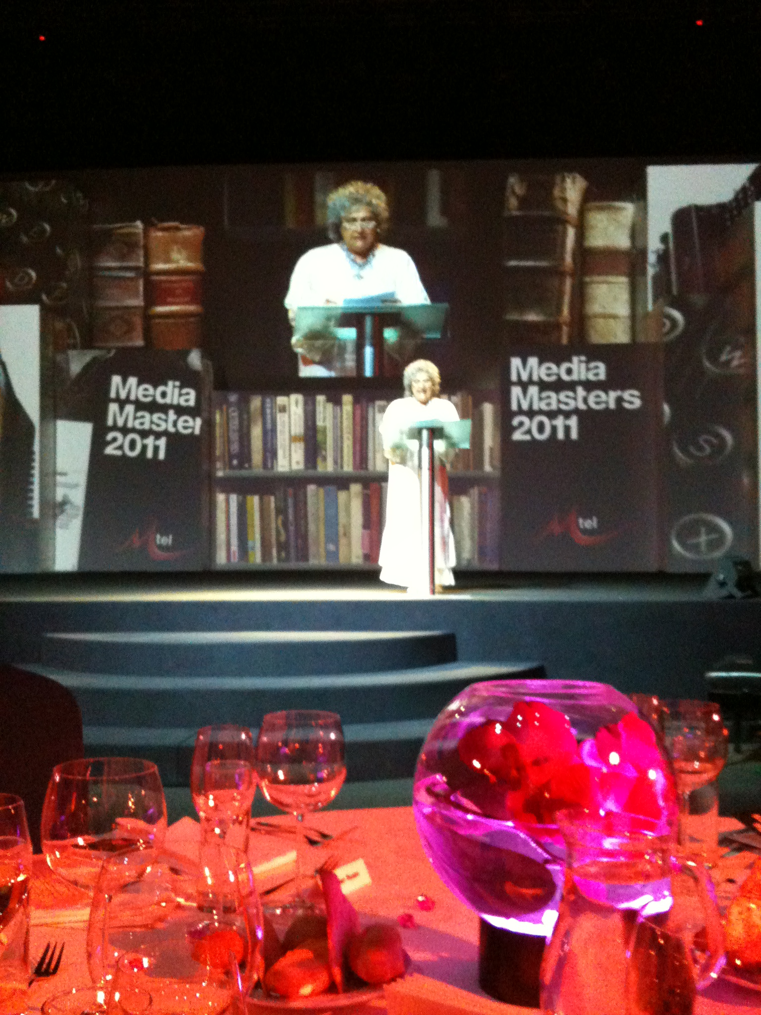 Лаура Ескивел в София май 2011 година